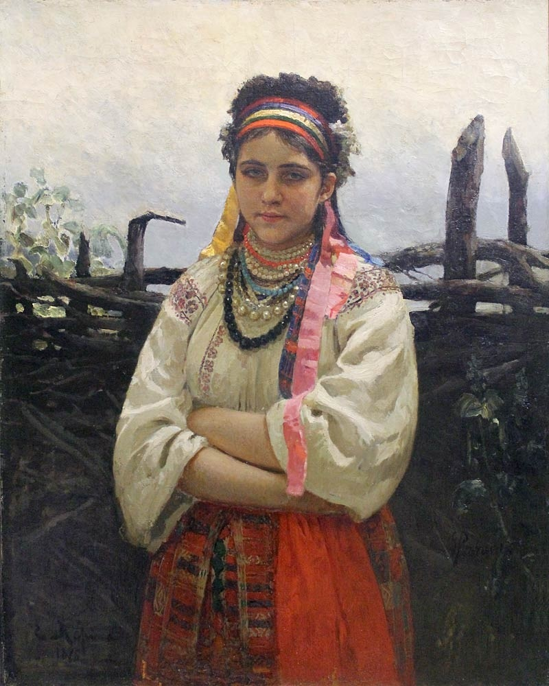 Украинка